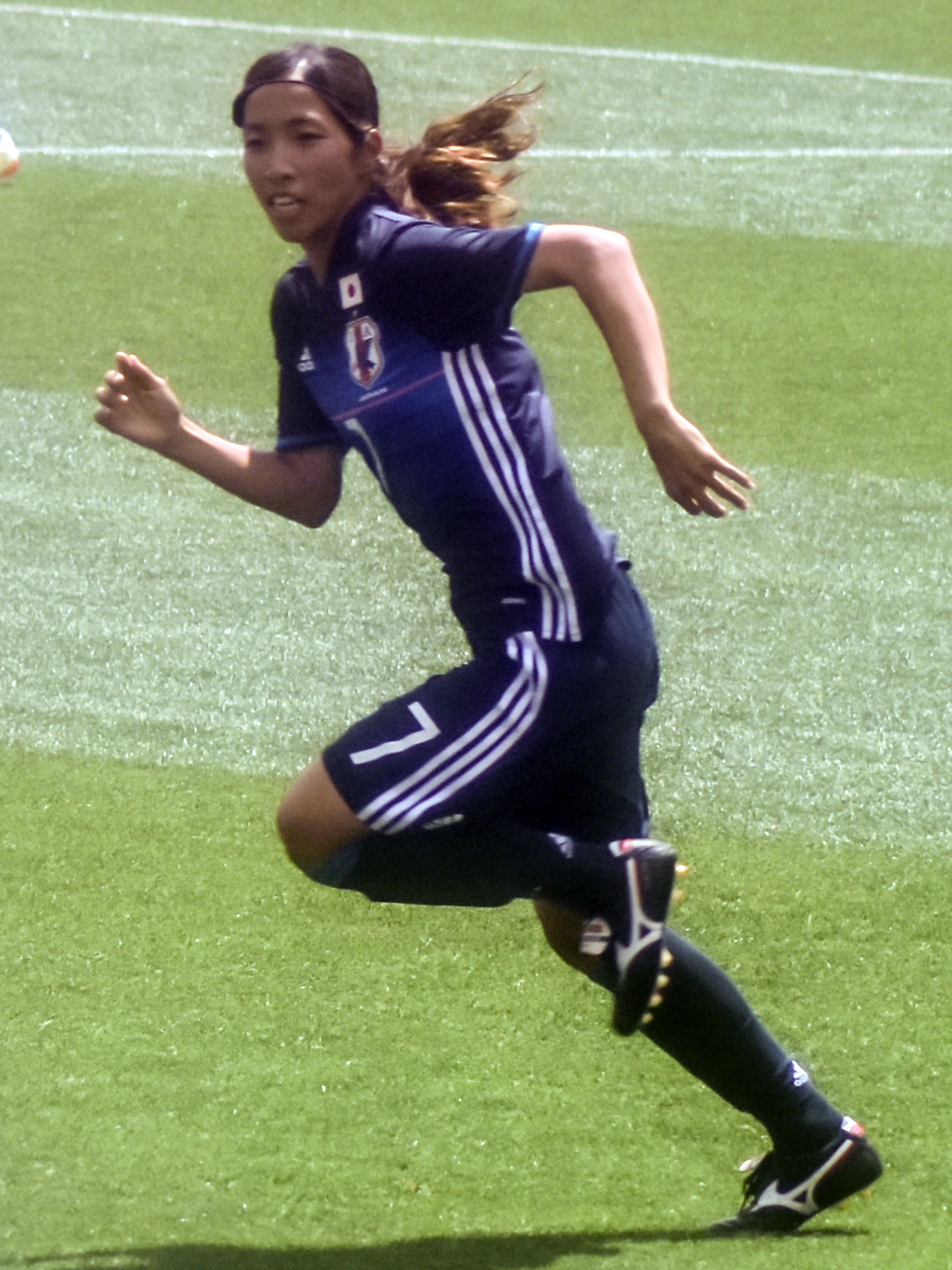 From Flickr user edrost88, match details here